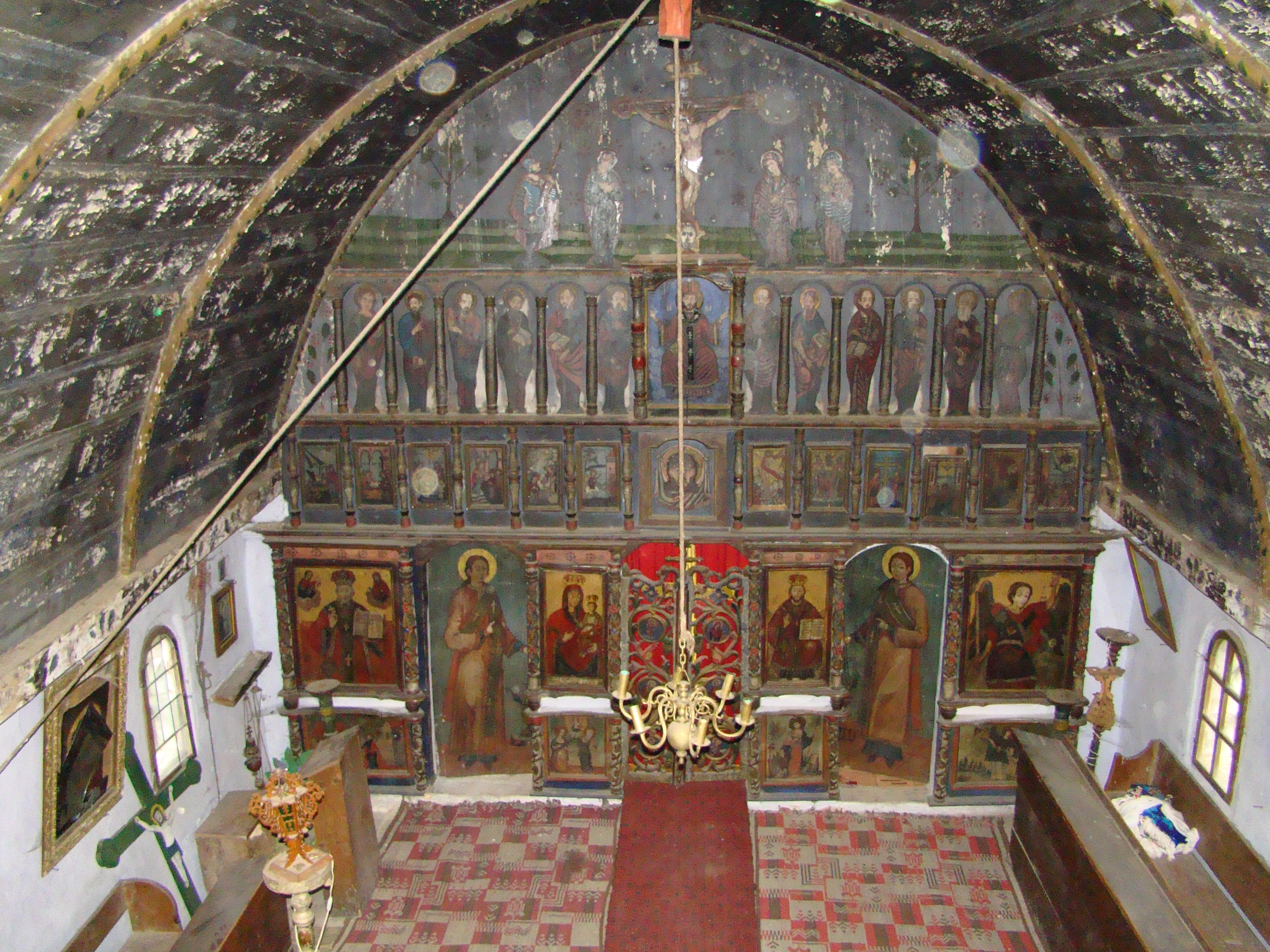 Biserica de lemn din Suplai-interioare